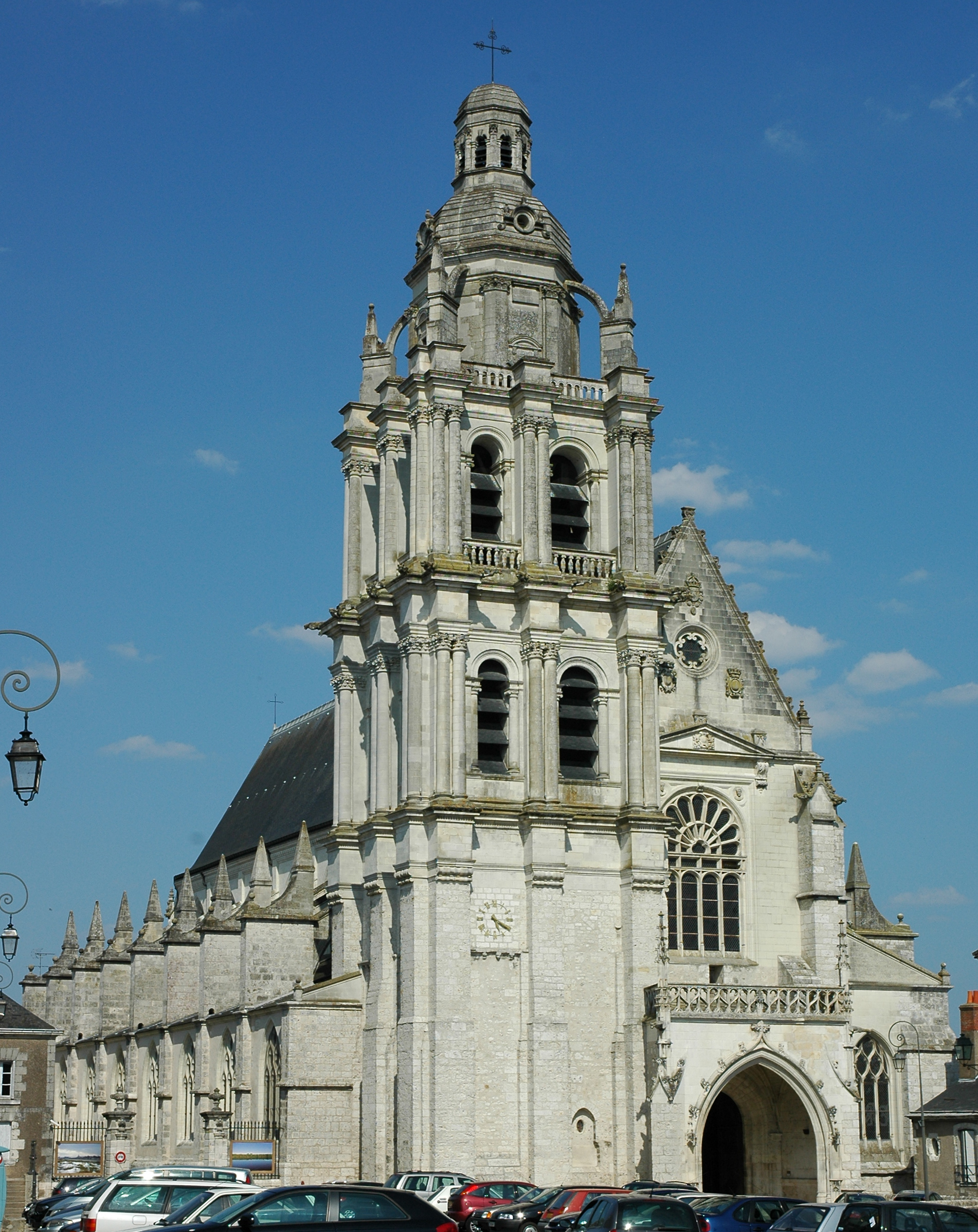 France Loir-et-Cher Blois Cathédrale SaintLouis Photographie prise par Patrick GIRAUD